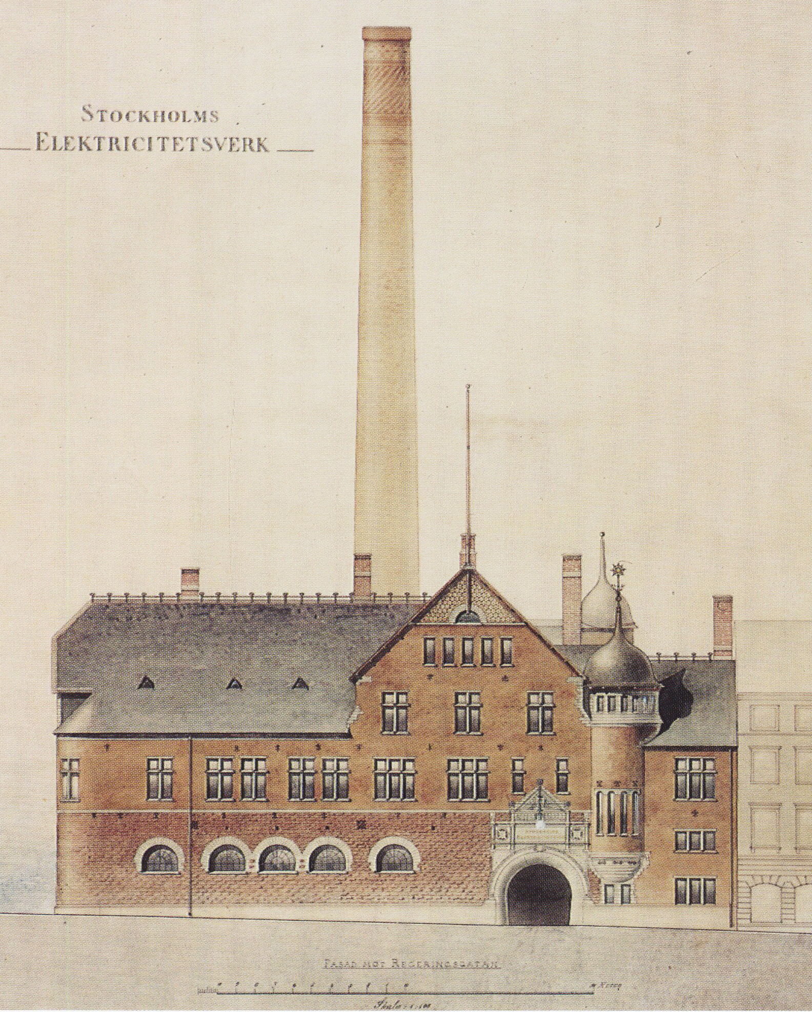 Brunkebergsverket, fasad mot Regeringsgatan, illustration av Ferdinand Boberg